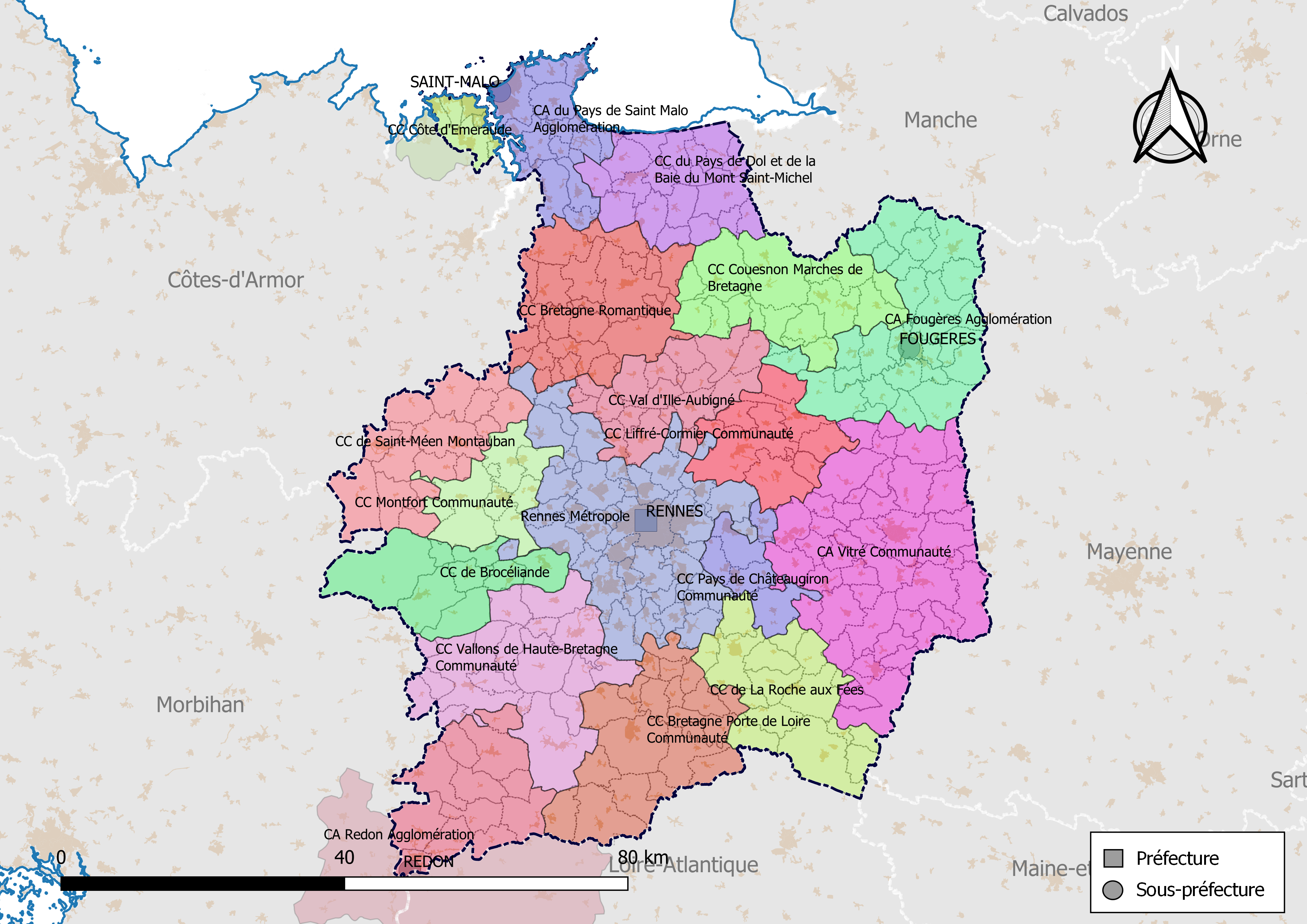 Carte des intercommunalités du département de l'Ille-et-Vilaine, France. Composition au 1er janvier 2019.